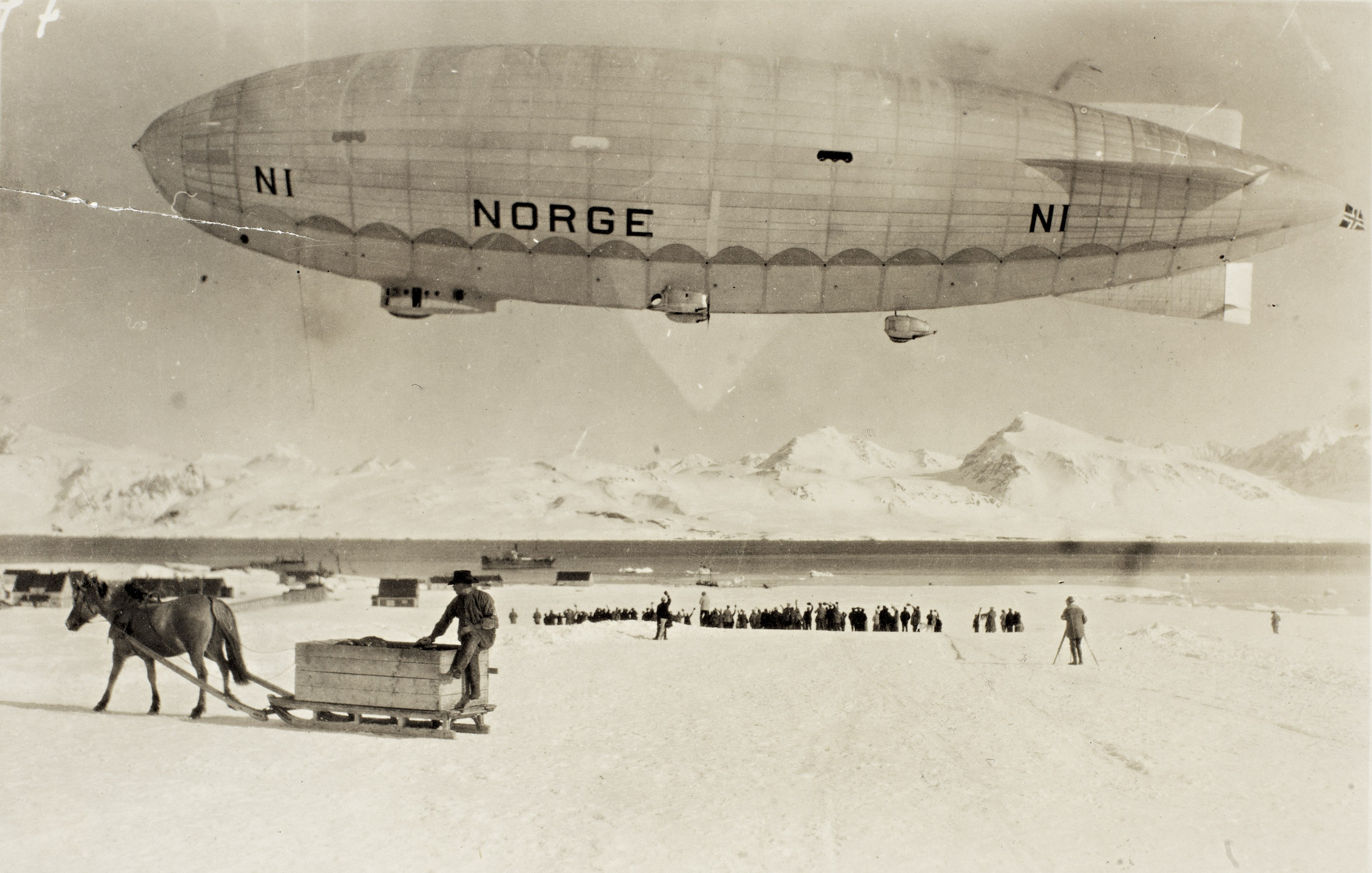 Tittel / Title: "Norge" over Ny-Ålesund ved avreisen mot Nordpolen Beskrivelse / Description: Gelatin papirpositiv. Dato / Date: 11. mai 1926 Fotograf / Photographer: ukjent / unknown Sted / Place: Svalbard, Ny-Ålesund Eier / Owner Institution: Nasjonalbiblioteket / National Library of Norway Lenke / Link: Bildesignatur / Image Number: bldsa_NPRA0093